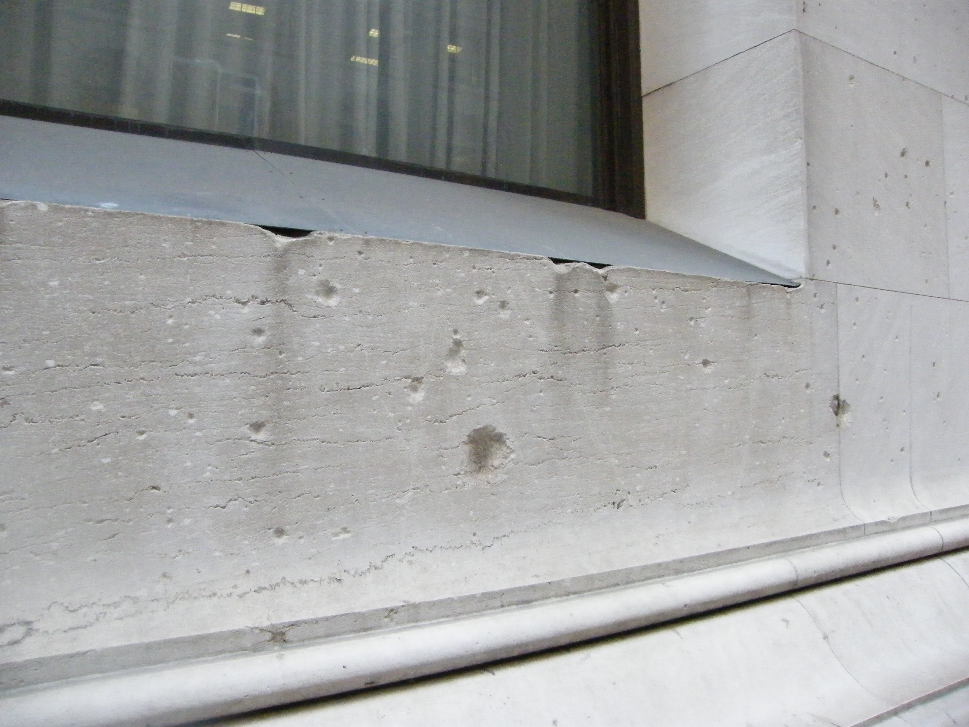 Restes de l'attentat du 16 septembre 1920.